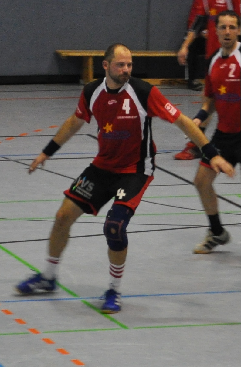 Der Handballspieler Philipp Klaus in seinem ersten Punktspiel für den Stralsunder HV am 30. Oktober 2010 in der Vogelsanghalle Stralsund gegen HSV Peenetal Loitz (31:25). Im Hintergrund rechts ist Karsten Ganschow zu sehen.